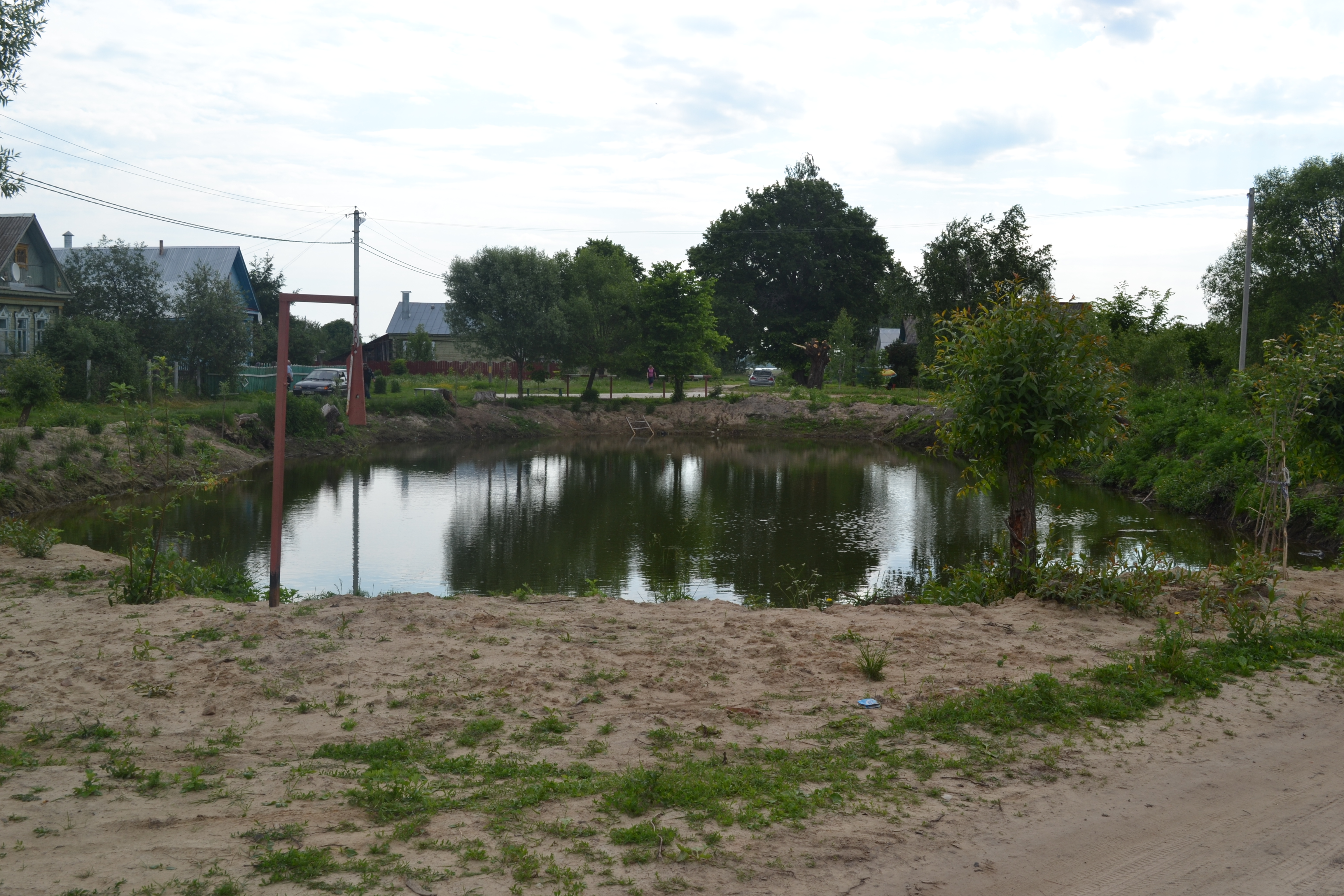 Пруд в деревне Чисома (Шатурский район)